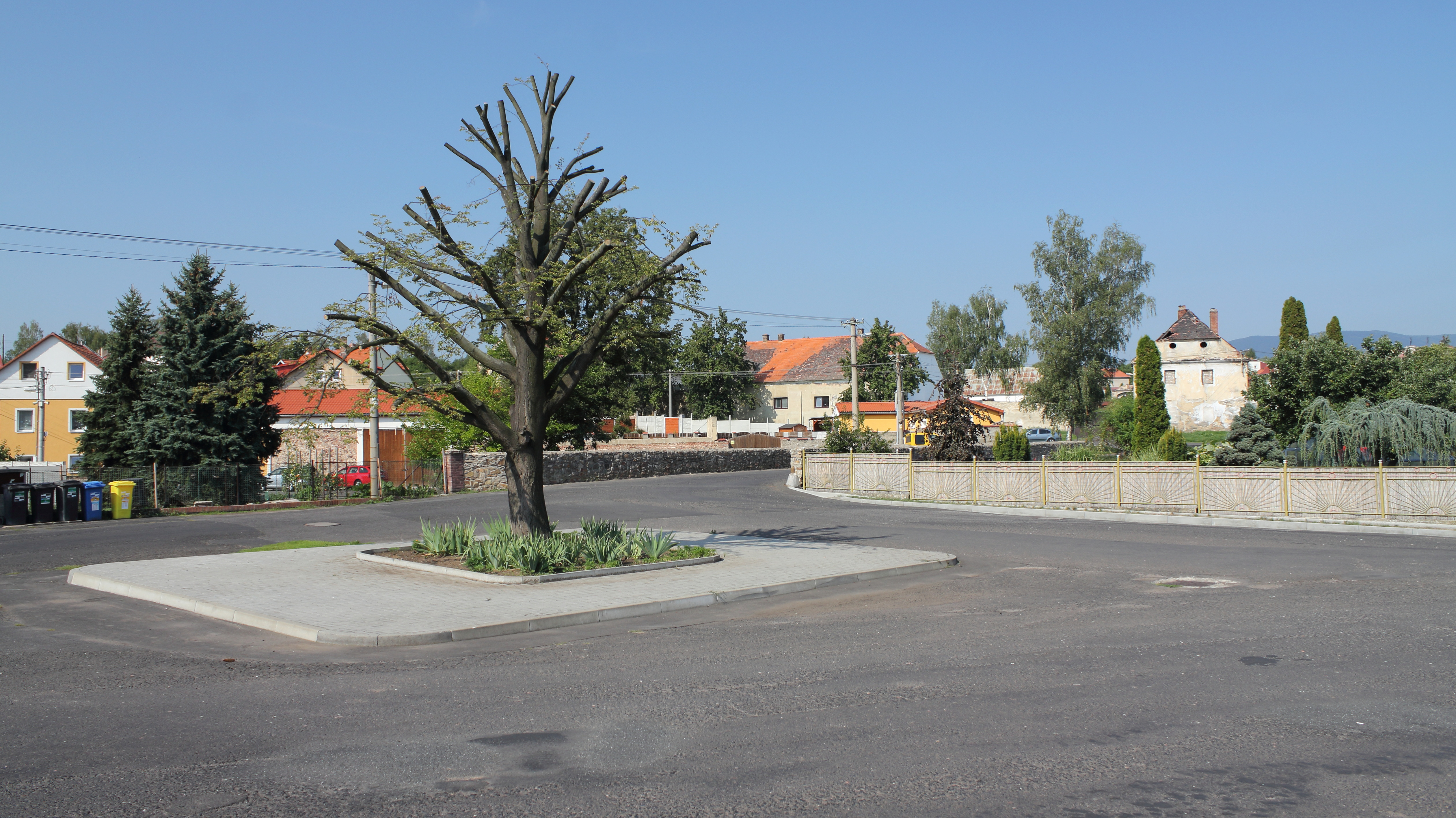 Želénky